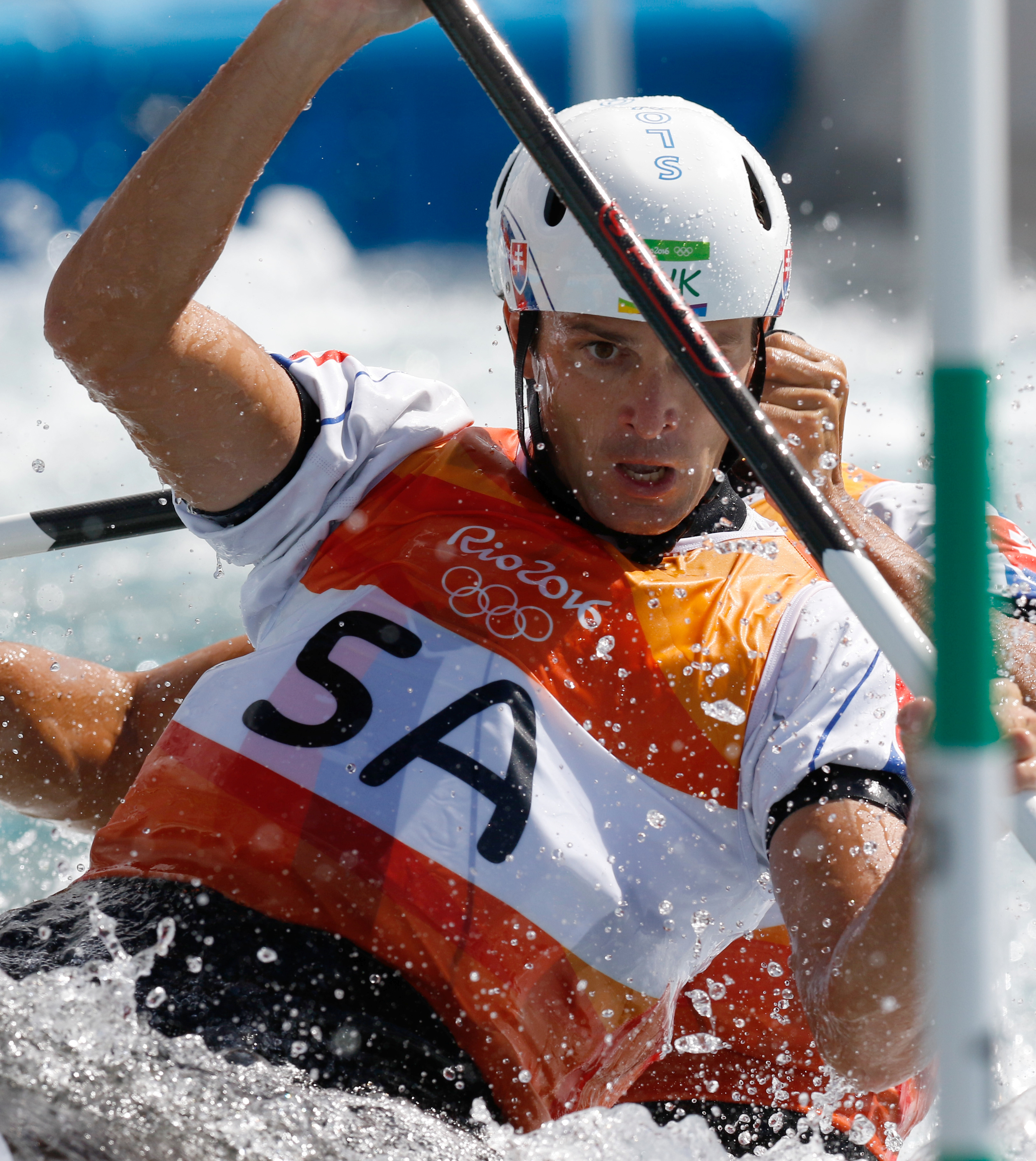 Rio de Janeiro - Irmãos eslovacos Ladislav Skantar e Peter Skanter levam medalha de ouro na canoagem slalom categoria C2 nos Jogos Olímpicos Rio 2016 no X Park em Deodoro (Fernando Frazão/Agência Brasil)